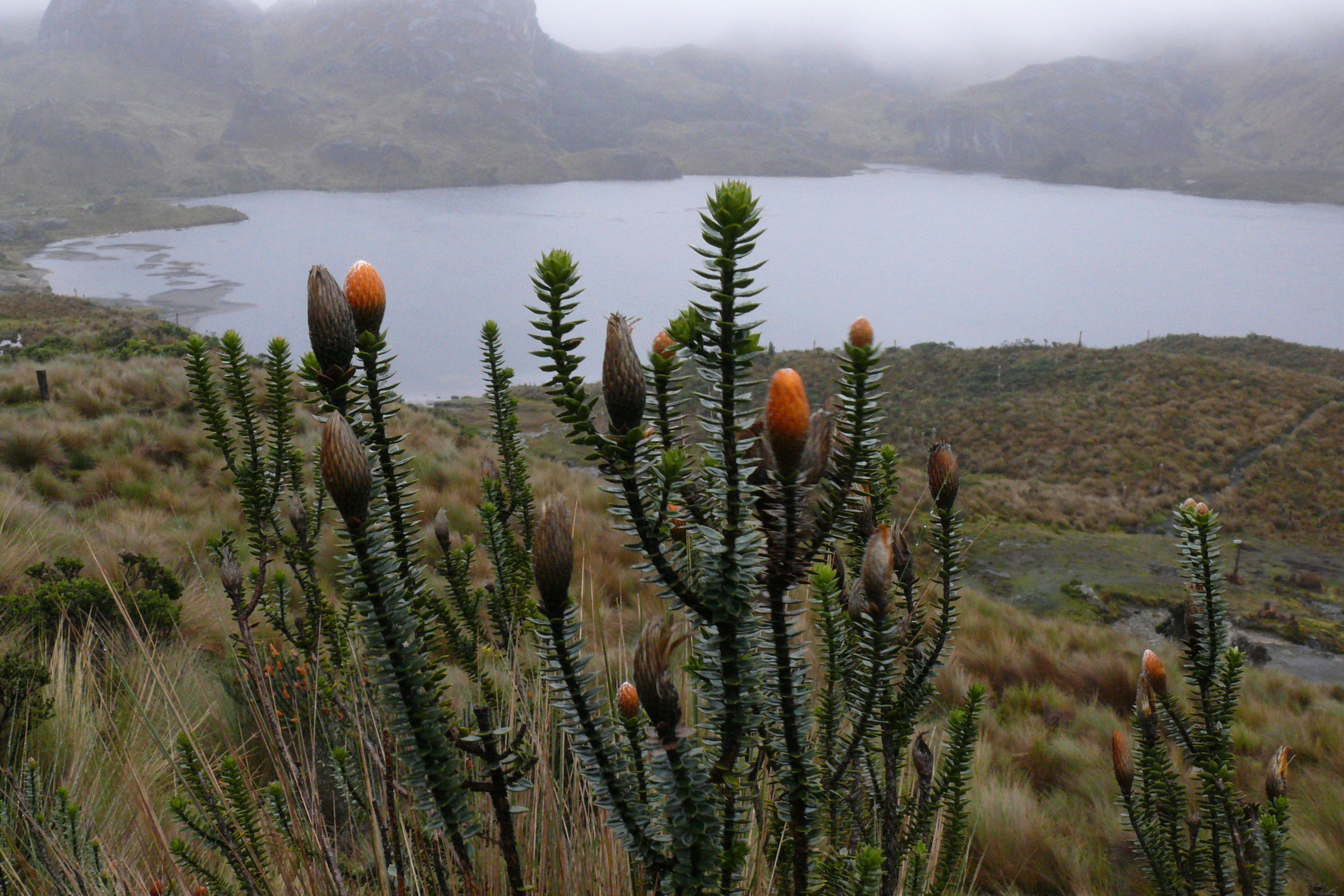 Chuquiraga (Chuquiraga jussieui). Place: Parque Nacional Cajas (Ecuador)